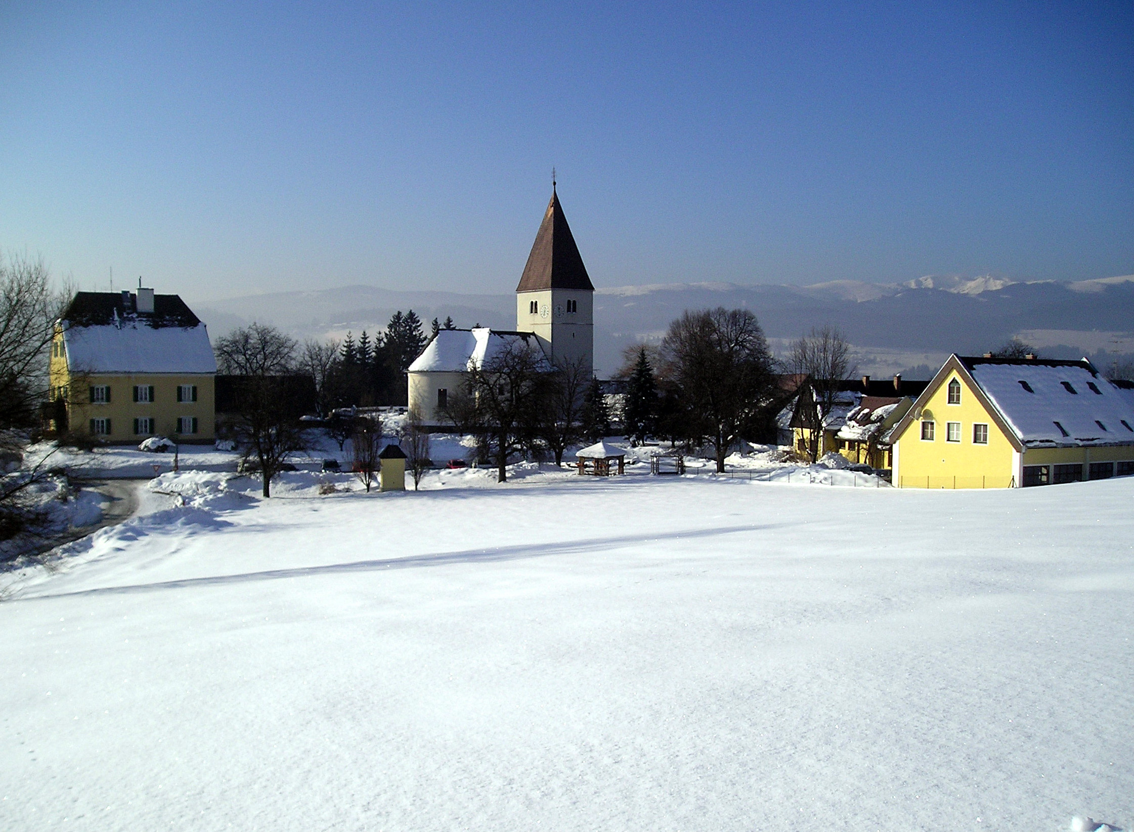 Winteraufnahme mit Blick auf das Dorfzentrum Freiland bei Deutschlandsberg, im Hintergrund sieht man die Koralpe. Aufnahme erstellt von Fklug, am 29.01.2006 um 10:45; Ortskern der Gemeinde Freiland bei Deutschlandsberg